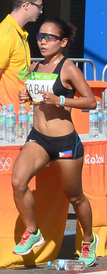 Passage du marathon des jeux olympiques de Rio 2016 dans le centre de Rio